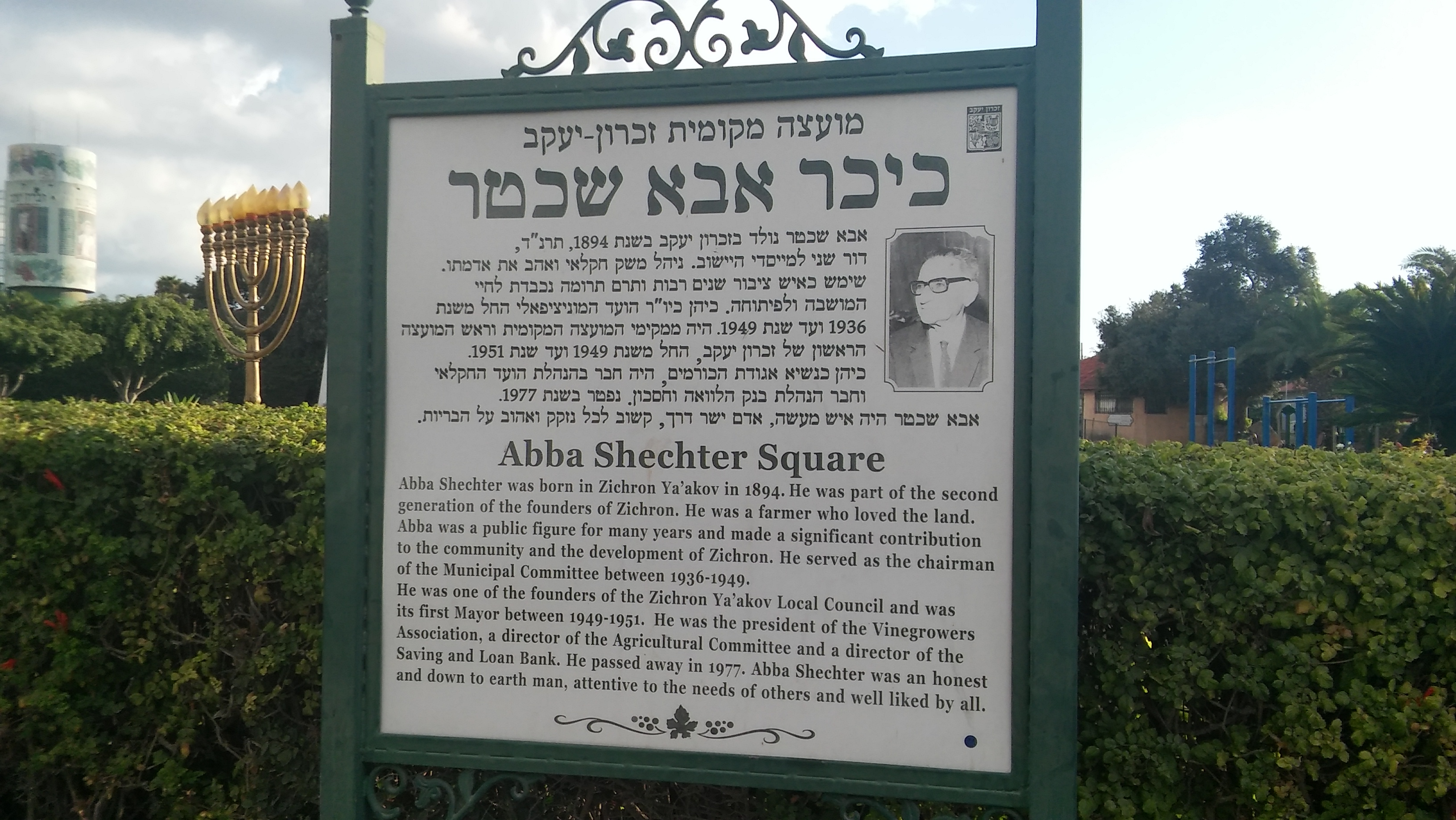 הכיכר ע"ש אבא שכטר ברחוב המייסדים בזכרון יעקב